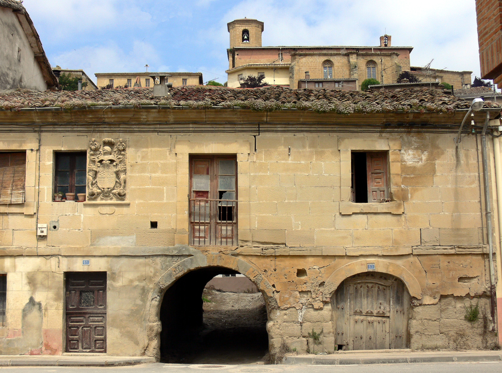 Treviana, municipio de La Rioja (España).